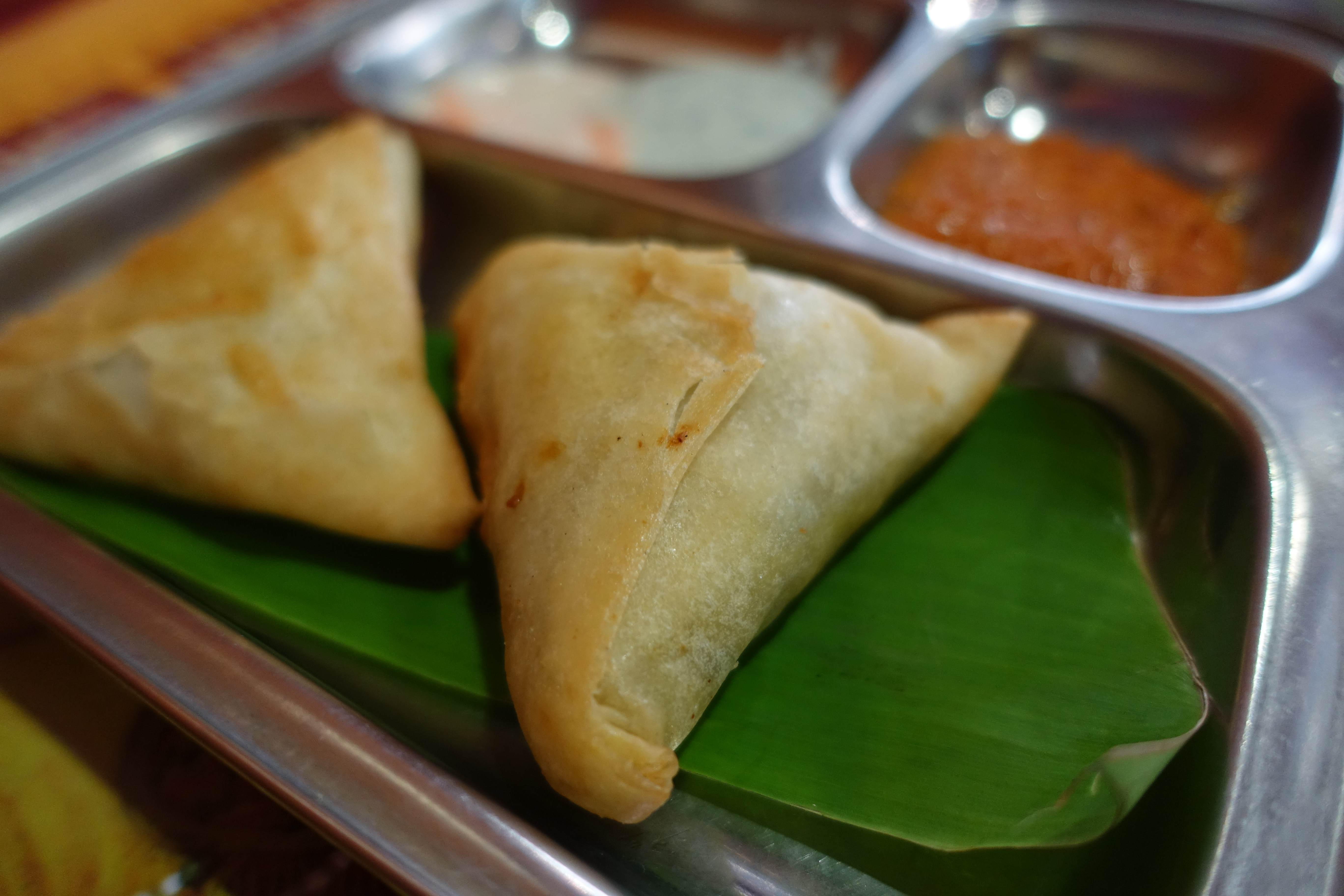 Samosa @ Krishna Bhavan @ Paris